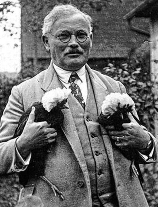 Jakob Bissinger (1873-1933), akademischer Kunstmaler in Hausen bei Bad Kissingen